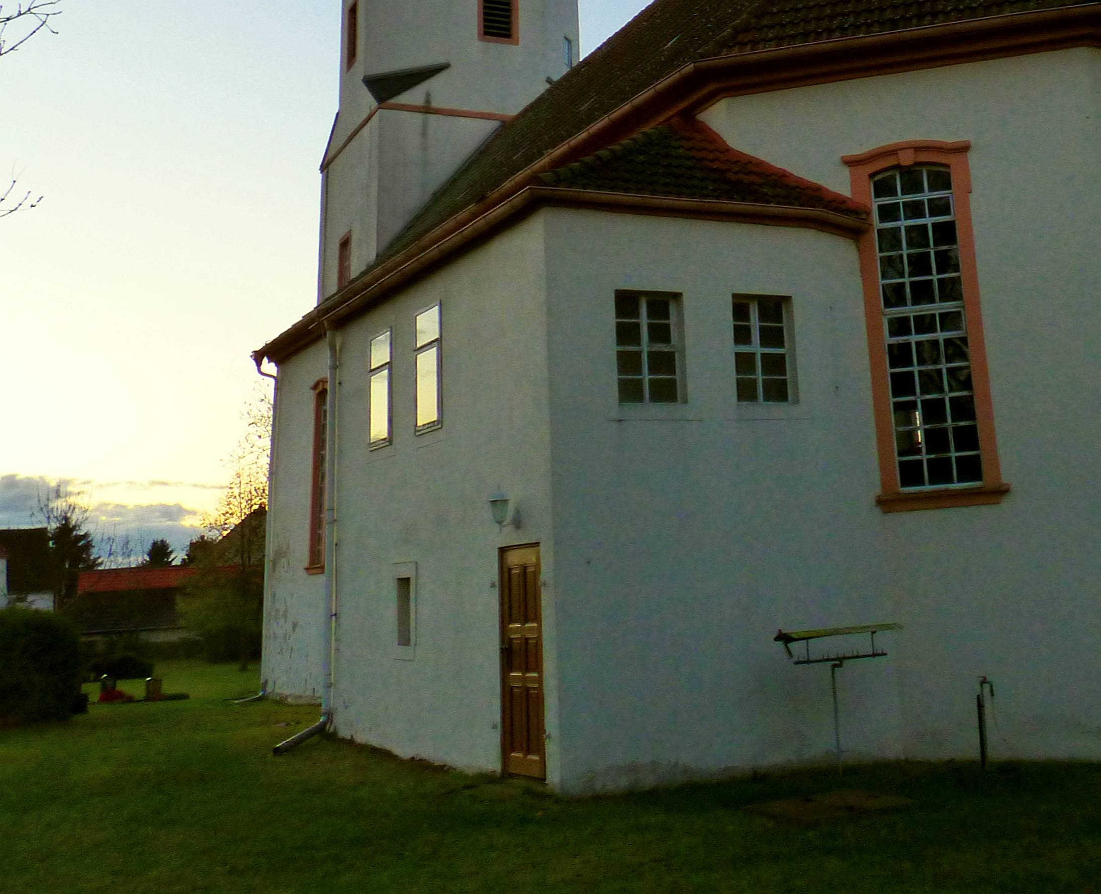 Patronatsloge der Dorfkirche Fichtenberg (Mühlberg/Elbe)